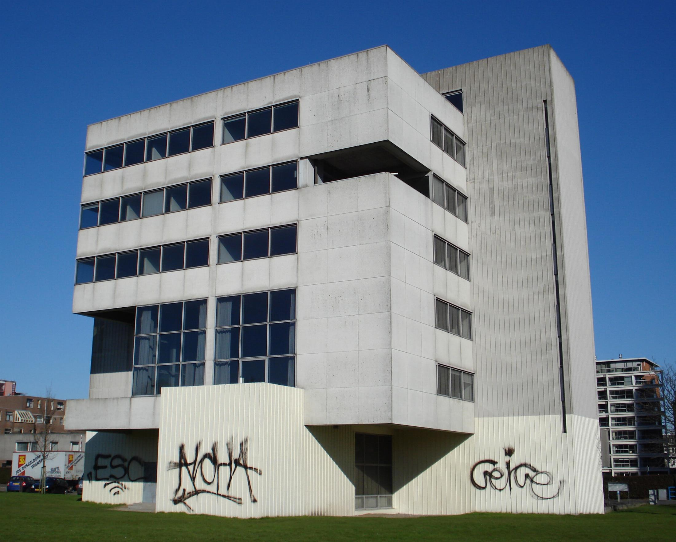 Rotterdam, Oostmaaslaan 950-952. Gemeentemonument.